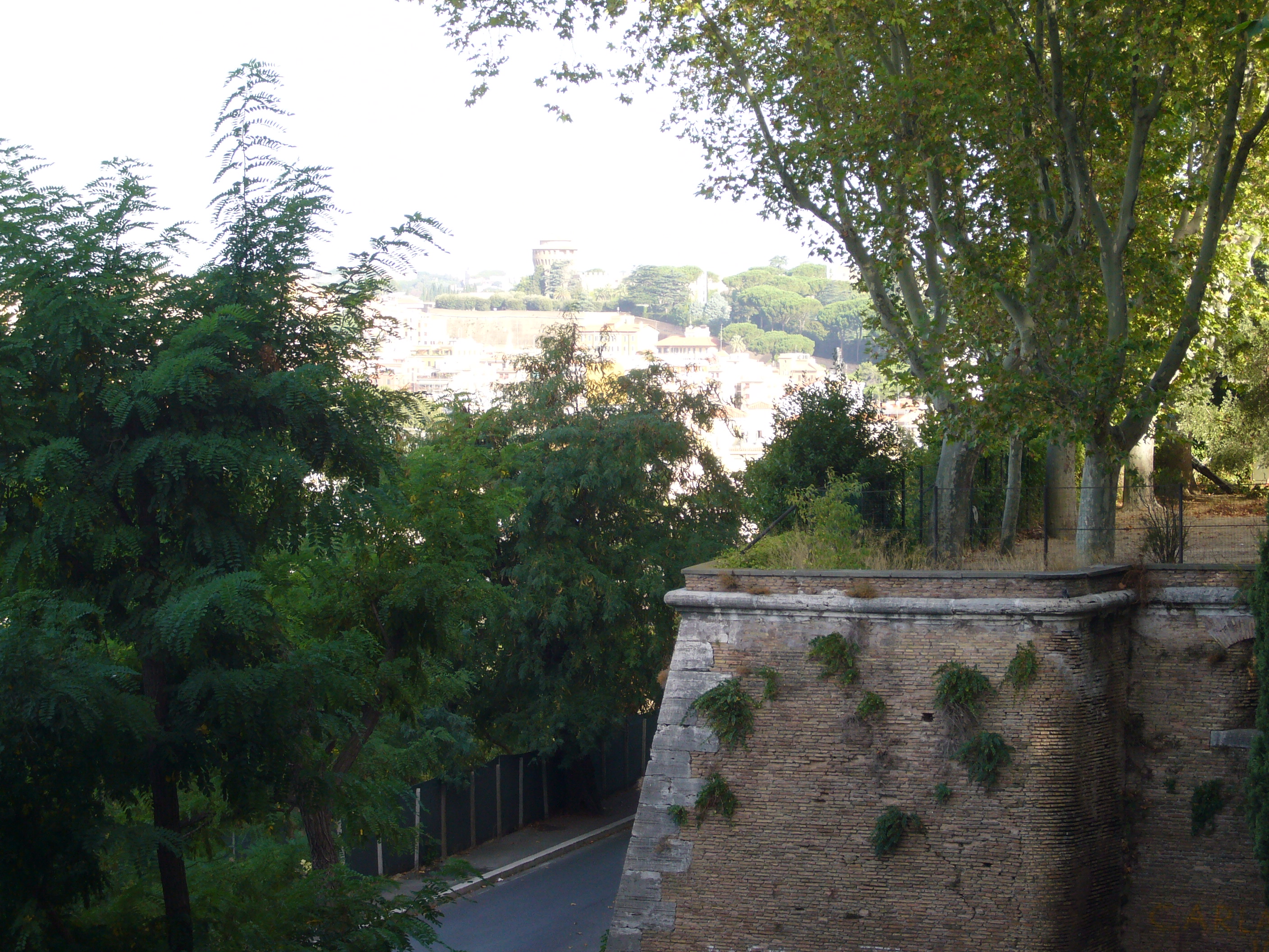 Roma, bastione delle mura gianicolensi verso san Pietro